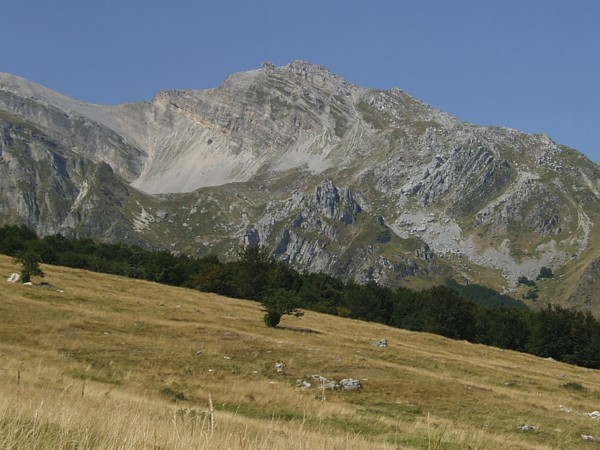 Picco Pio XI seen from Prati di Tivo